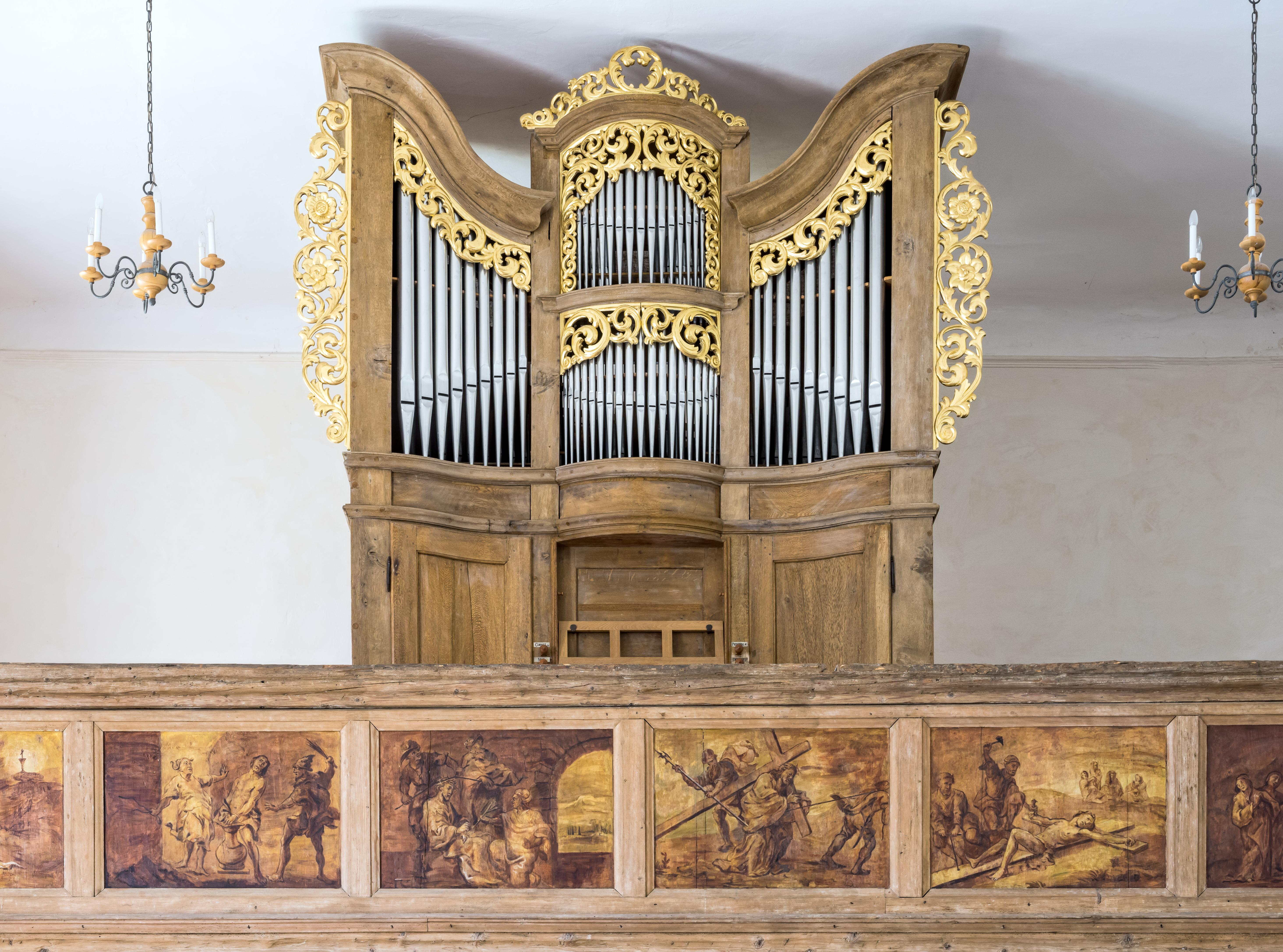 St. Michaelis in Niederrotweil Die Kirche ist einer der ältesten im Breisgau. Entstehung und Frühzeit ist nicht dokumentiert. Die frühromanische Bauform deutet auf das 11. Jahrhundert für dieses Bauwerk. Die erste Urkunde die die Kirche erwähnt stammt aus dem Jahre 1175. Die Kirche liegt am Badischen Teils des Jakobswegs von Rust nach Breisach